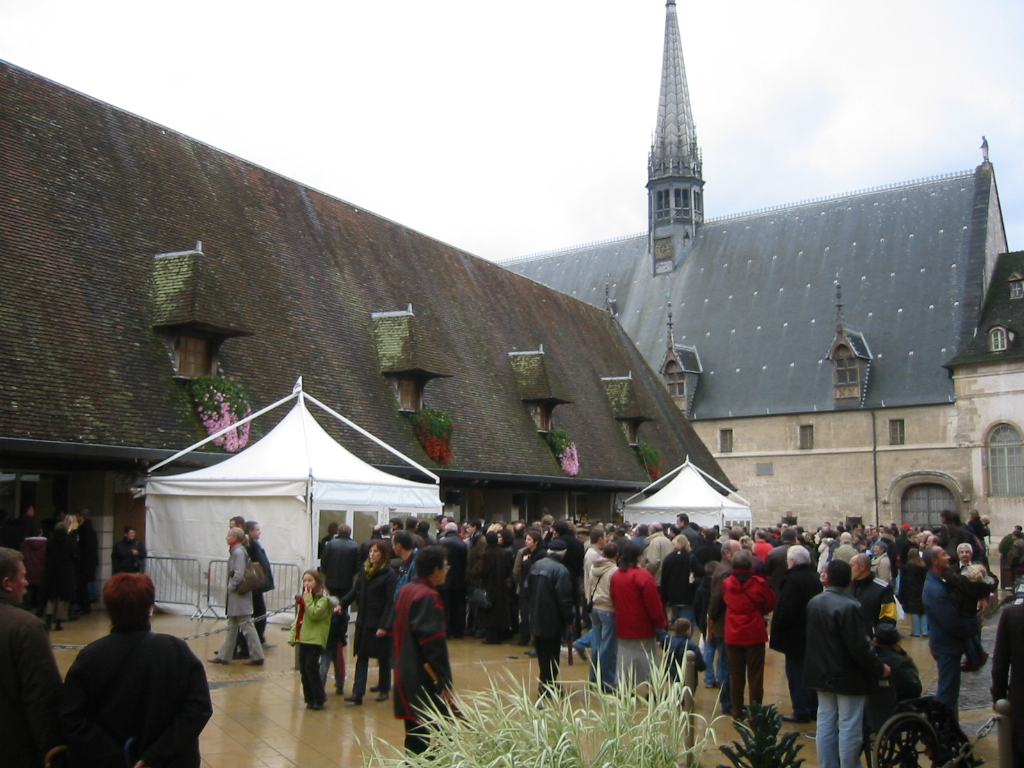 Vente des hospices de Beaune, Hotel Dieu et salle des ventes des halles / marché couvert de Beaune